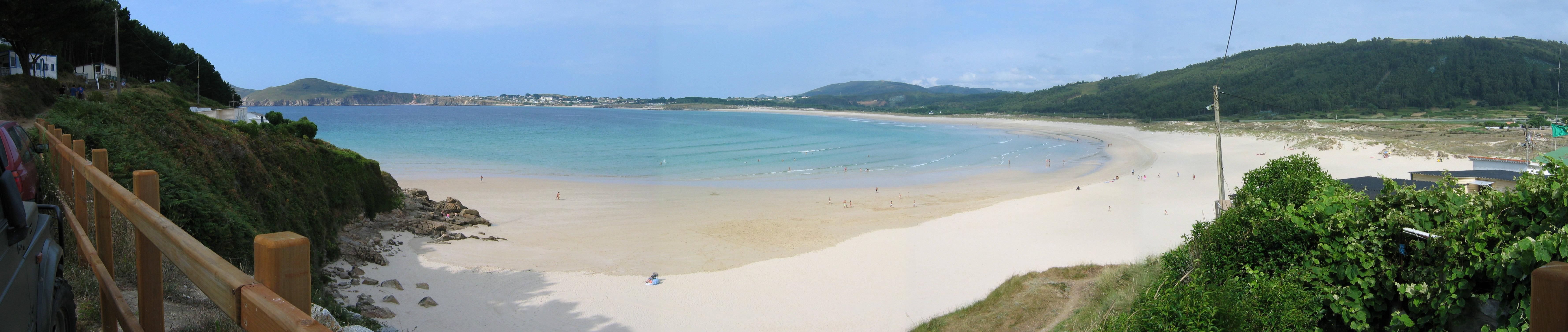 praia de San Xurxo